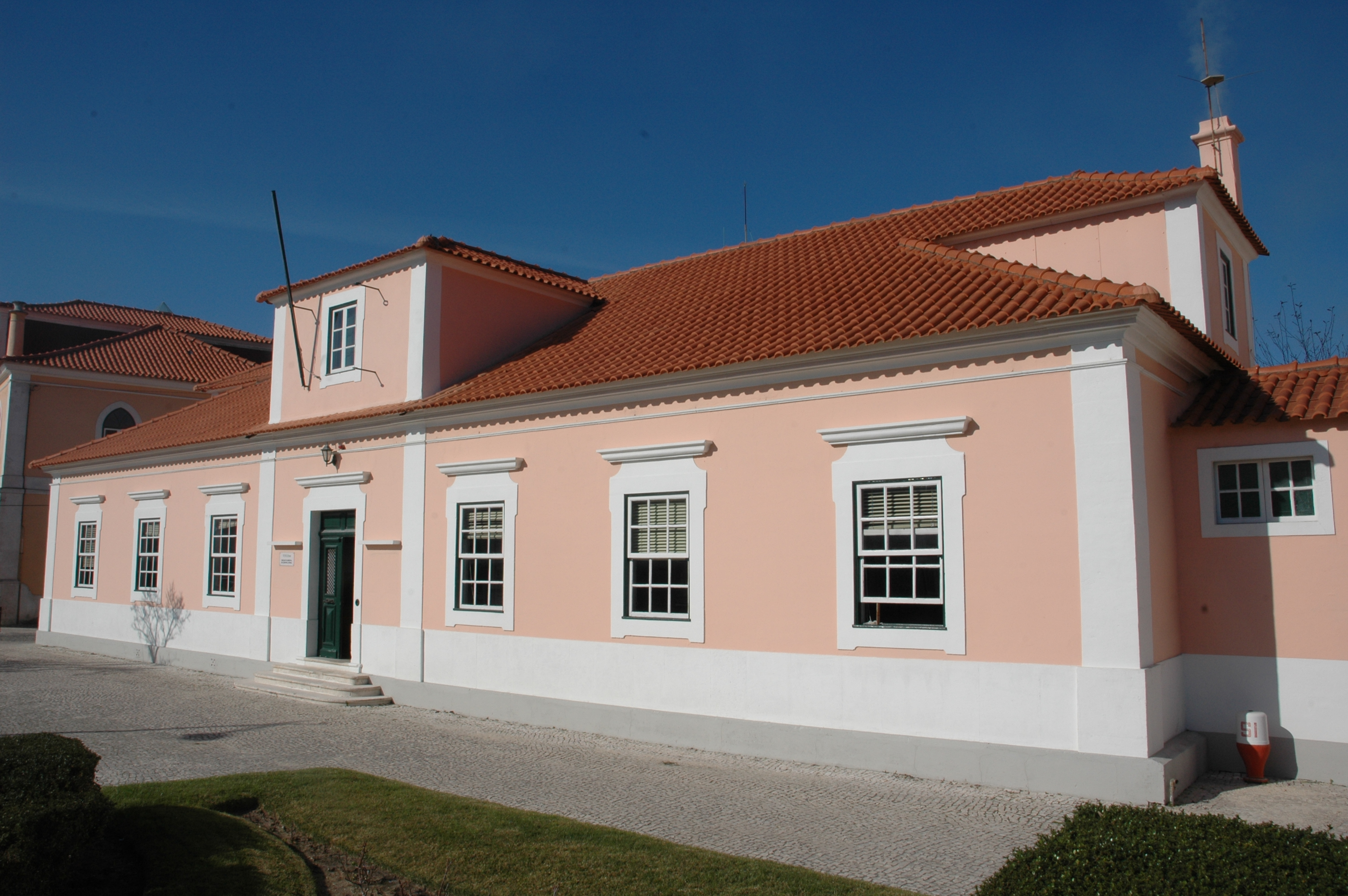 Edifício dos serviços do Instituto da Conservação da Natureza e das Florestas na Marinha Grande. Antiga sede da Administração Geral das Matas do Reino (1824-1881).